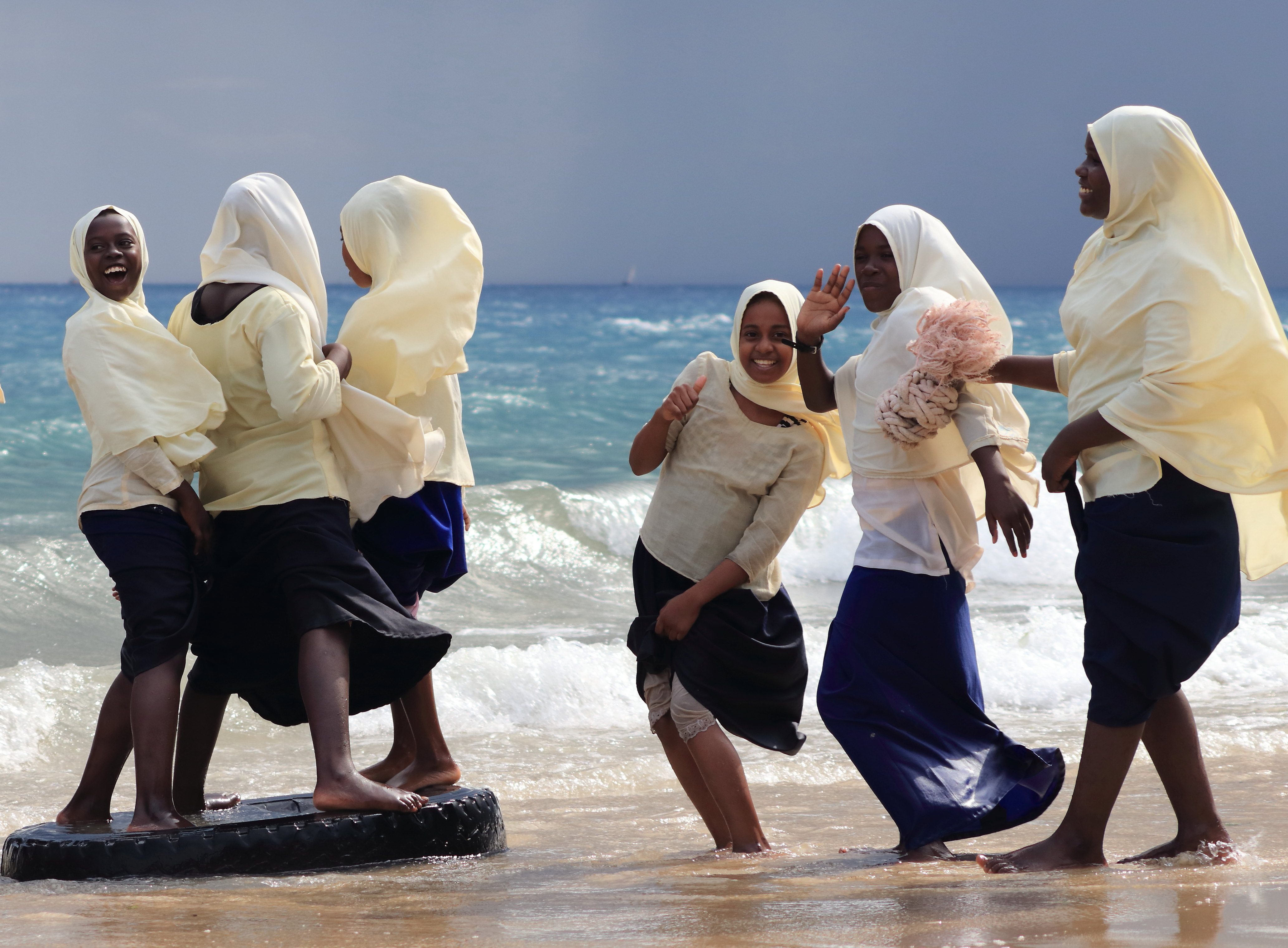 Pour ces jeunes filles le chemin de l'école passe par la plage de Stone Town, c'est l'occasion de prendre du bon temps entre amies. This is an image with the theme "Play" from: Tanzania